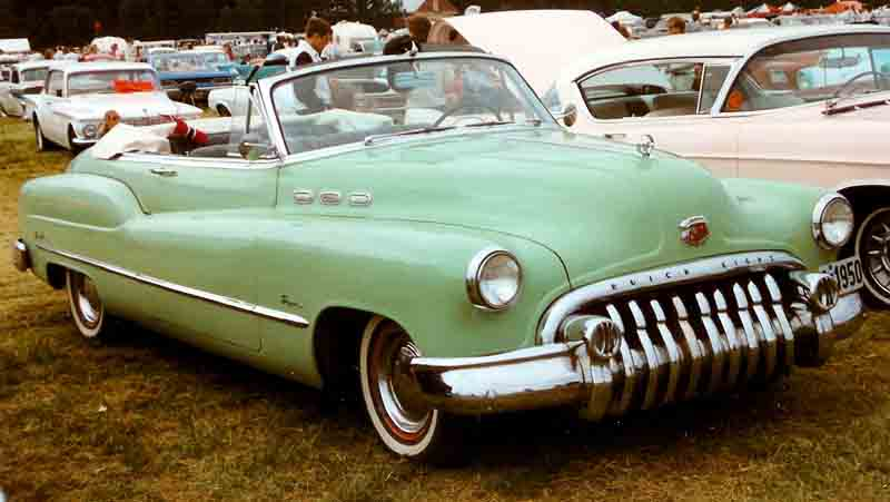 1950 Buick Super Series 50 Model 56C Convertible Coupe